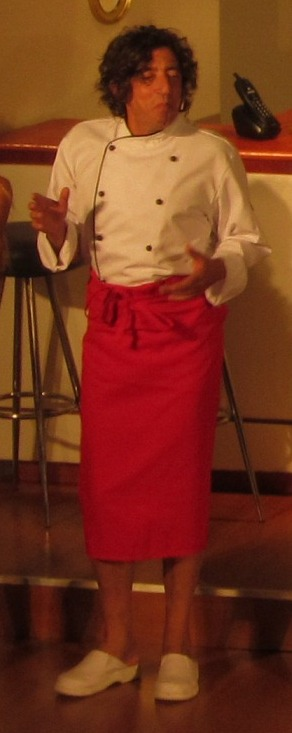 Alejandro Müller en la obra de teatro Que gauchita mi mucama.